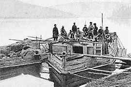 Паузок на Лене. Фотография экспедиции 1881 года. Фотография из фонда музея Арктики и Антарктики